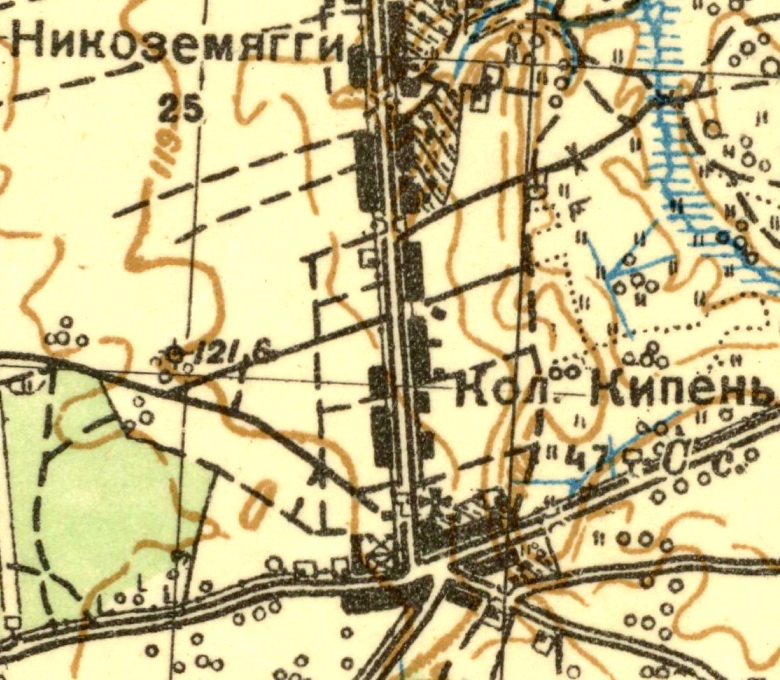 Топографическая карта Ленинградской области, квадрат О-35-12-Г (Ропша), деревня Кипень